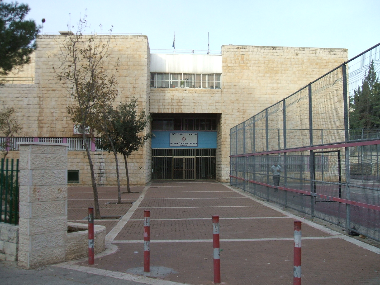 Shmuel Hanavi community center, Jerusalem